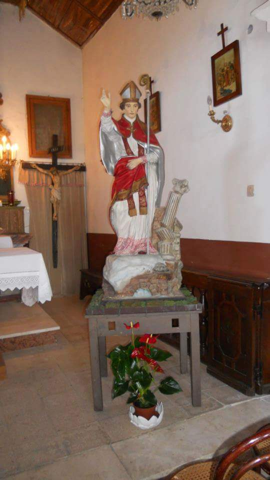 Statua di Sant'Emidio chiesa di Poggio Vitellino, Amatrice, RI, Italia